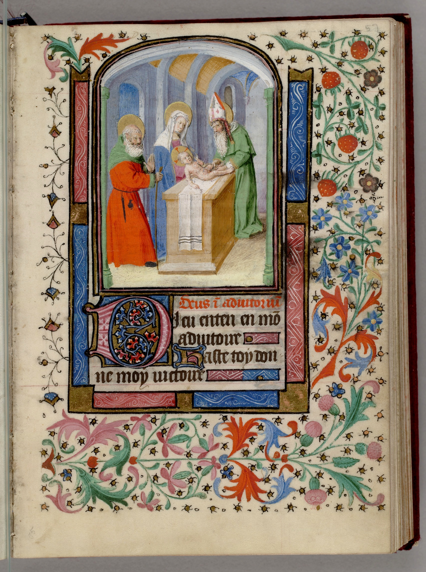 Circoncision.